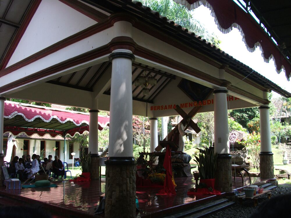 Kapel La Storta Novisiat Serikat Yesus Girisonta